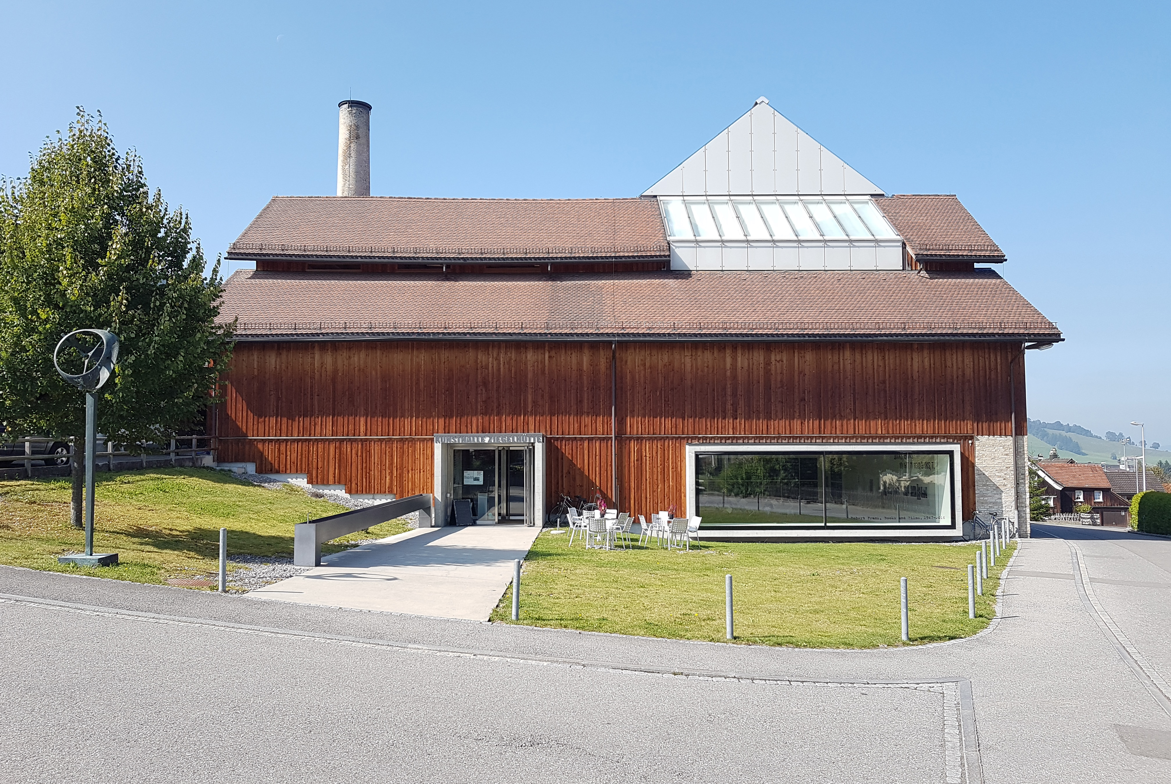 Kunsthalle Ziegelhütte, Appenzell, Schweiz, von außen